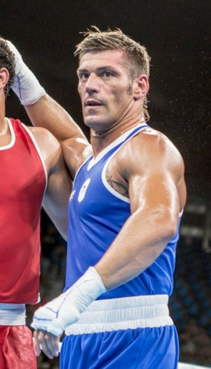 Day 3